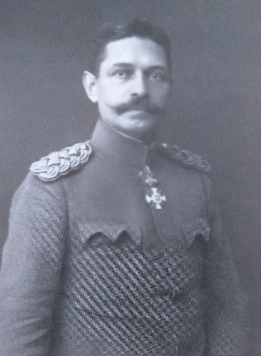 Српски (ћирилица): Михаило Јовановић, генерал